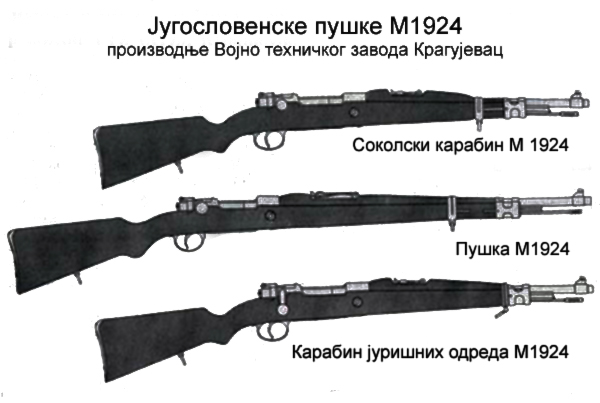 Илустрација: Пушке М1924 Војно-техничког завода у Крагујевцу. Аутор: Велибор Рајковић